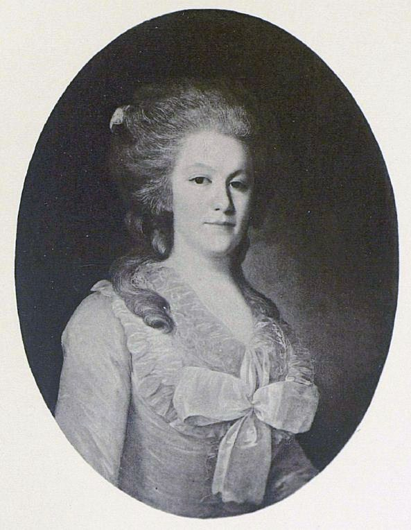 Прасковья Фёдоровна Гагарина, урож. Воейкова (1757-1801), жена Г.П.Гагарина (1745-1808).